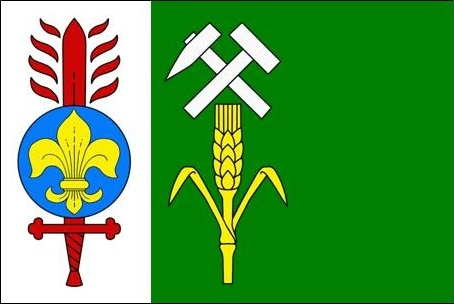 vlajka obce Meclov